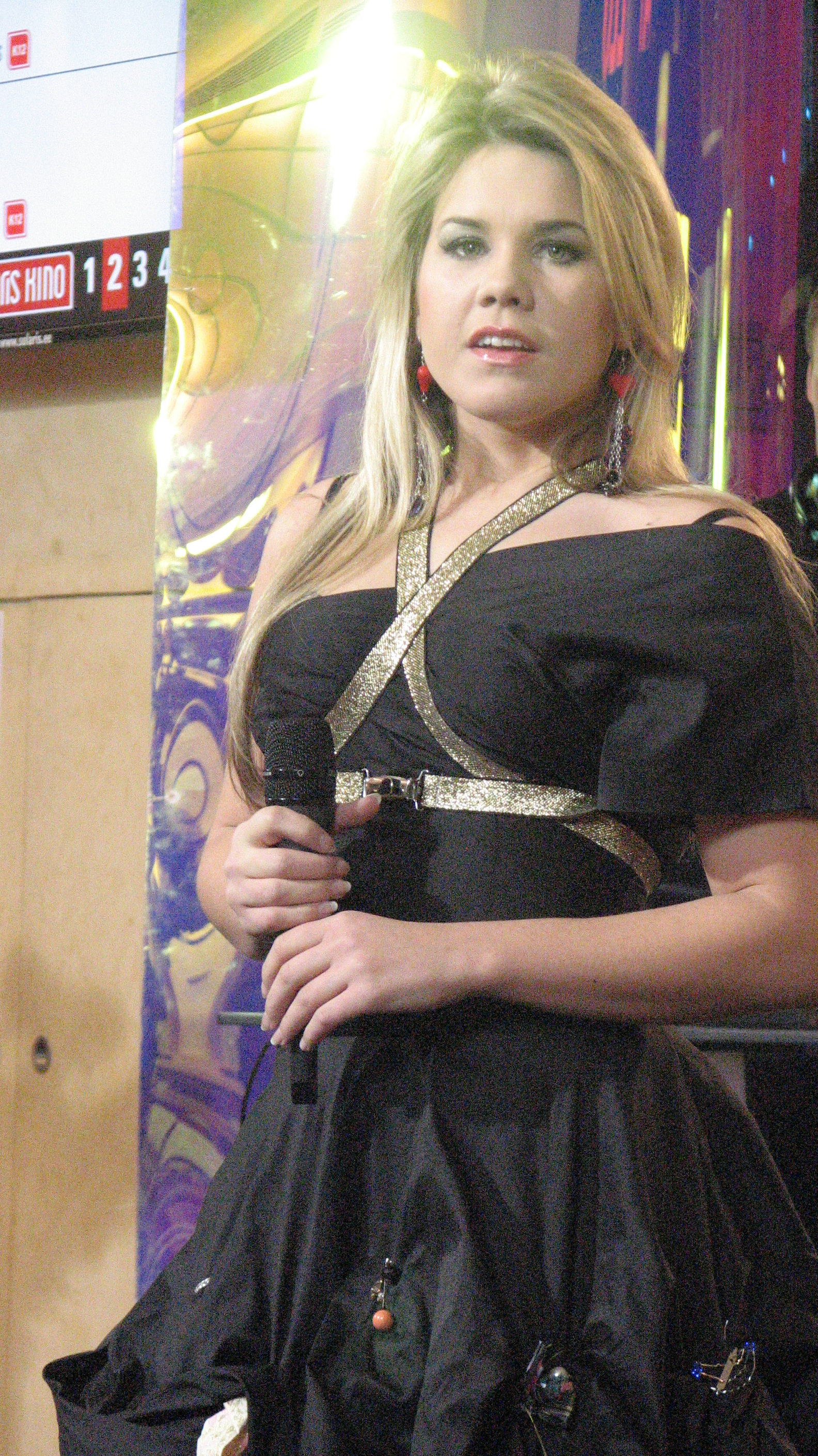 Mia "Ringvaate Eesti Laulu" salvestusel